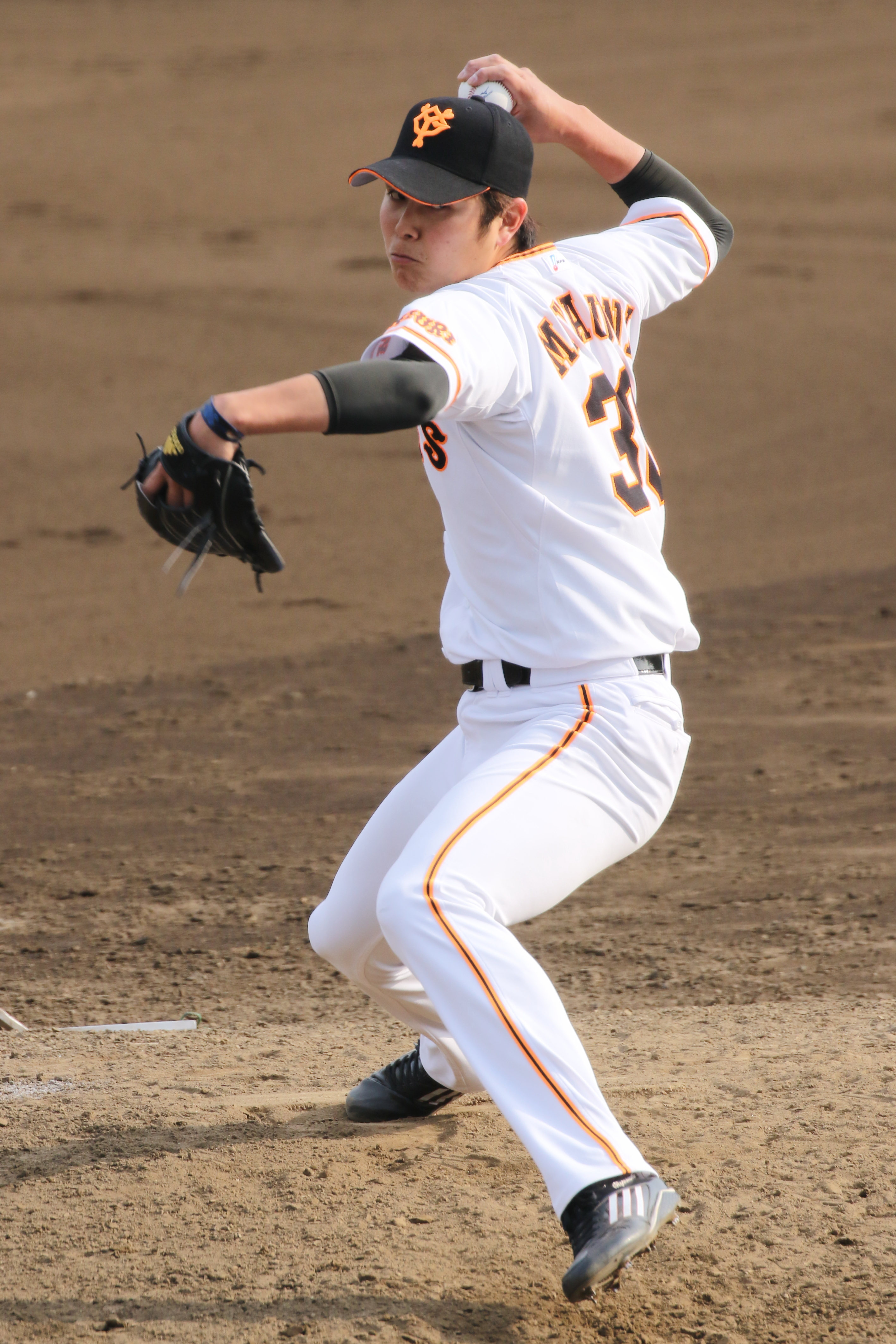 ジャイアンツ宮國選手